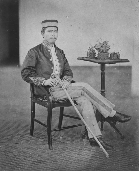 Foto. Portret van een rijksbestuurder met de titel Tuanku Jaksa, rechterhand van de Sultan van Deli